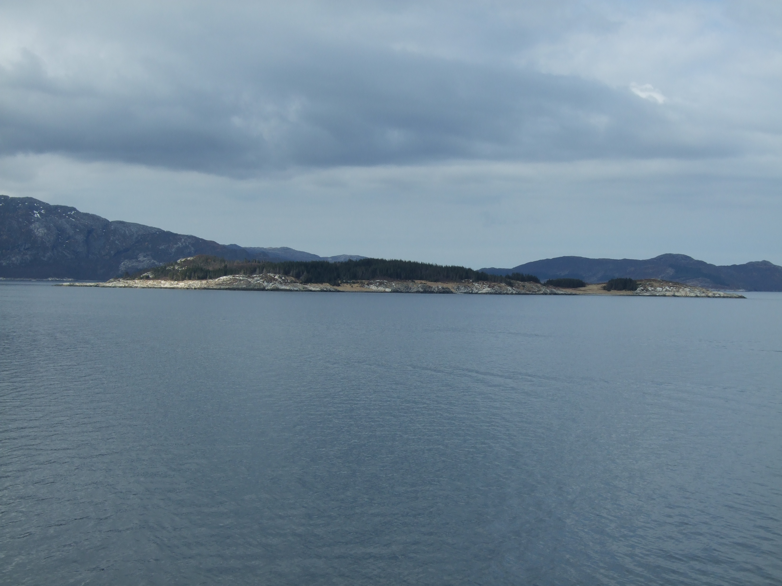 Finnkona